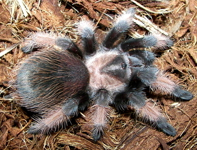 Brachypelma emilia